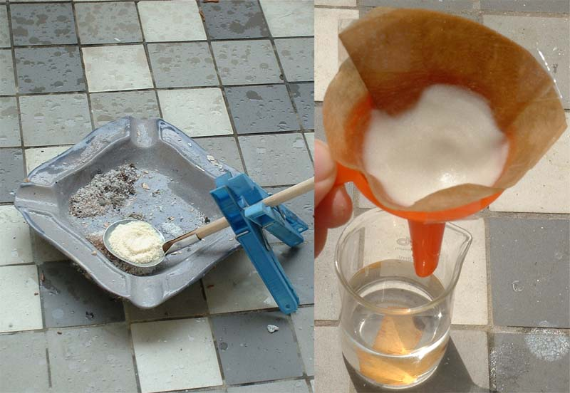 dokumentation von KCN-synthese